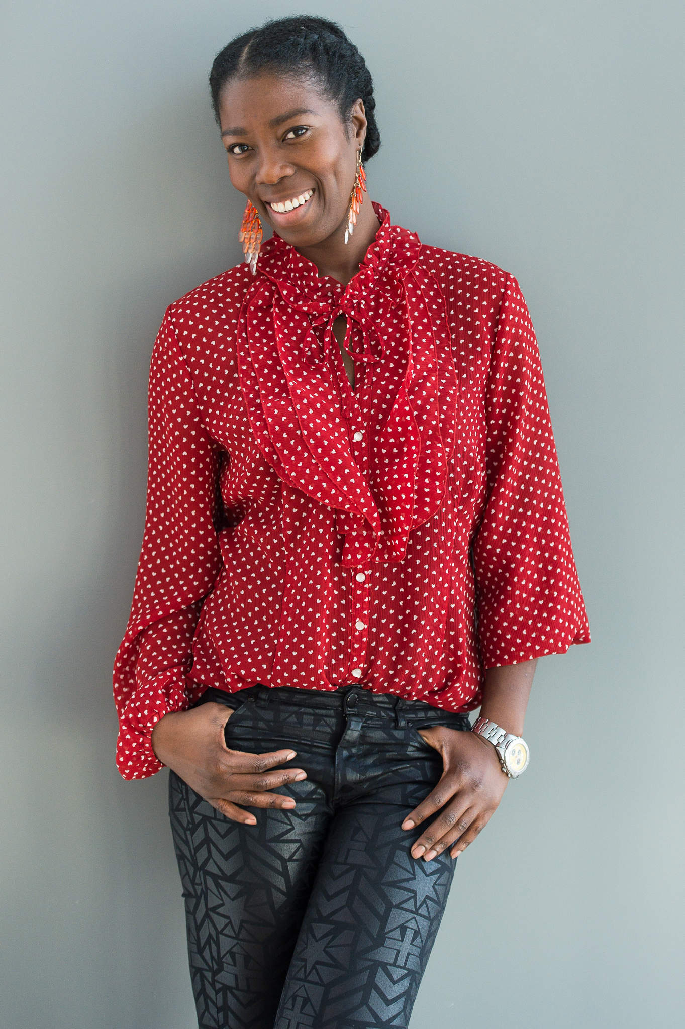 BR,Bayerischer Rundfunk,Bayerisches Fernsehen,Dayan Kodua,Filmbrunch 2017